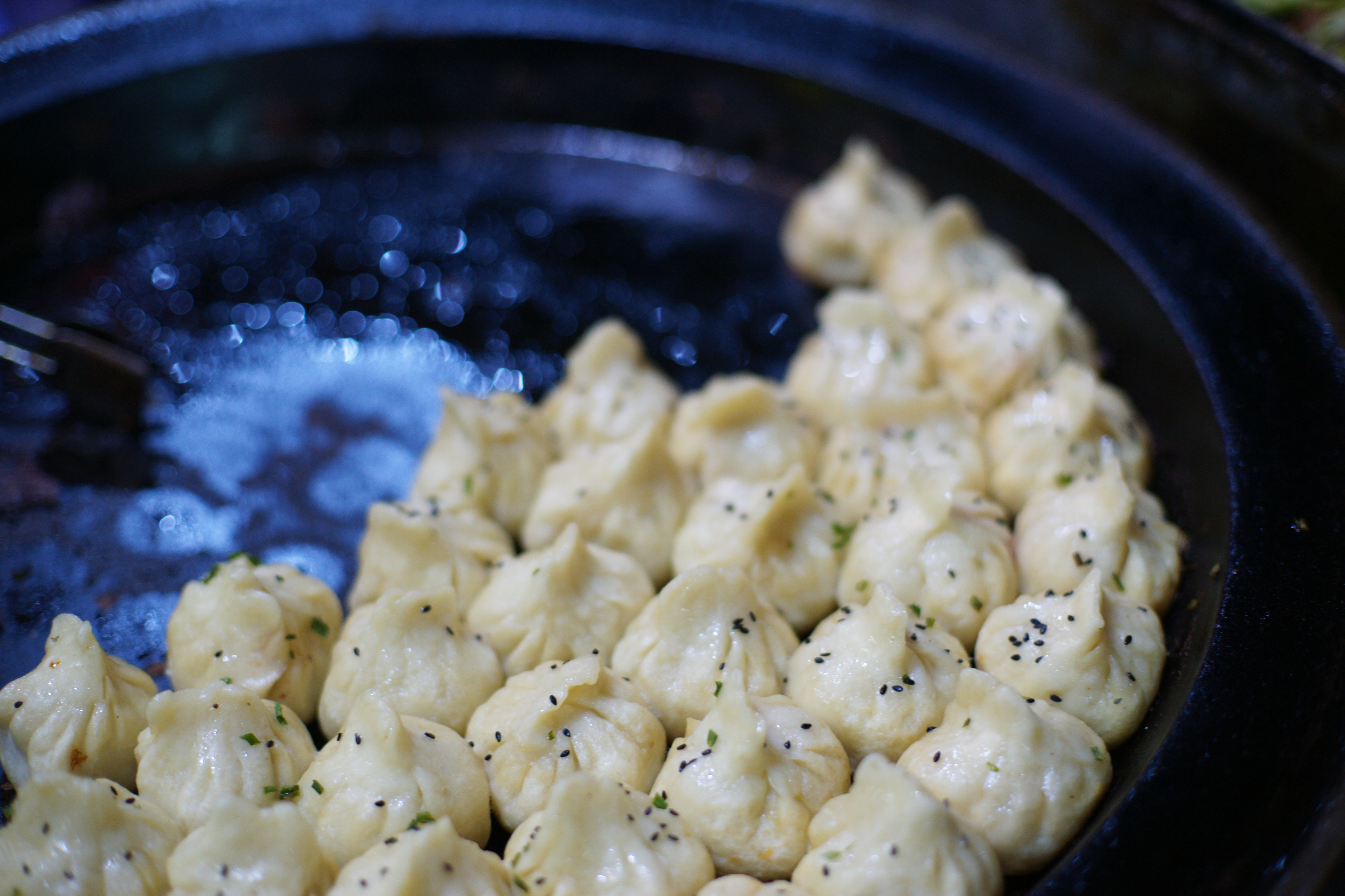 raviolis chinois frits